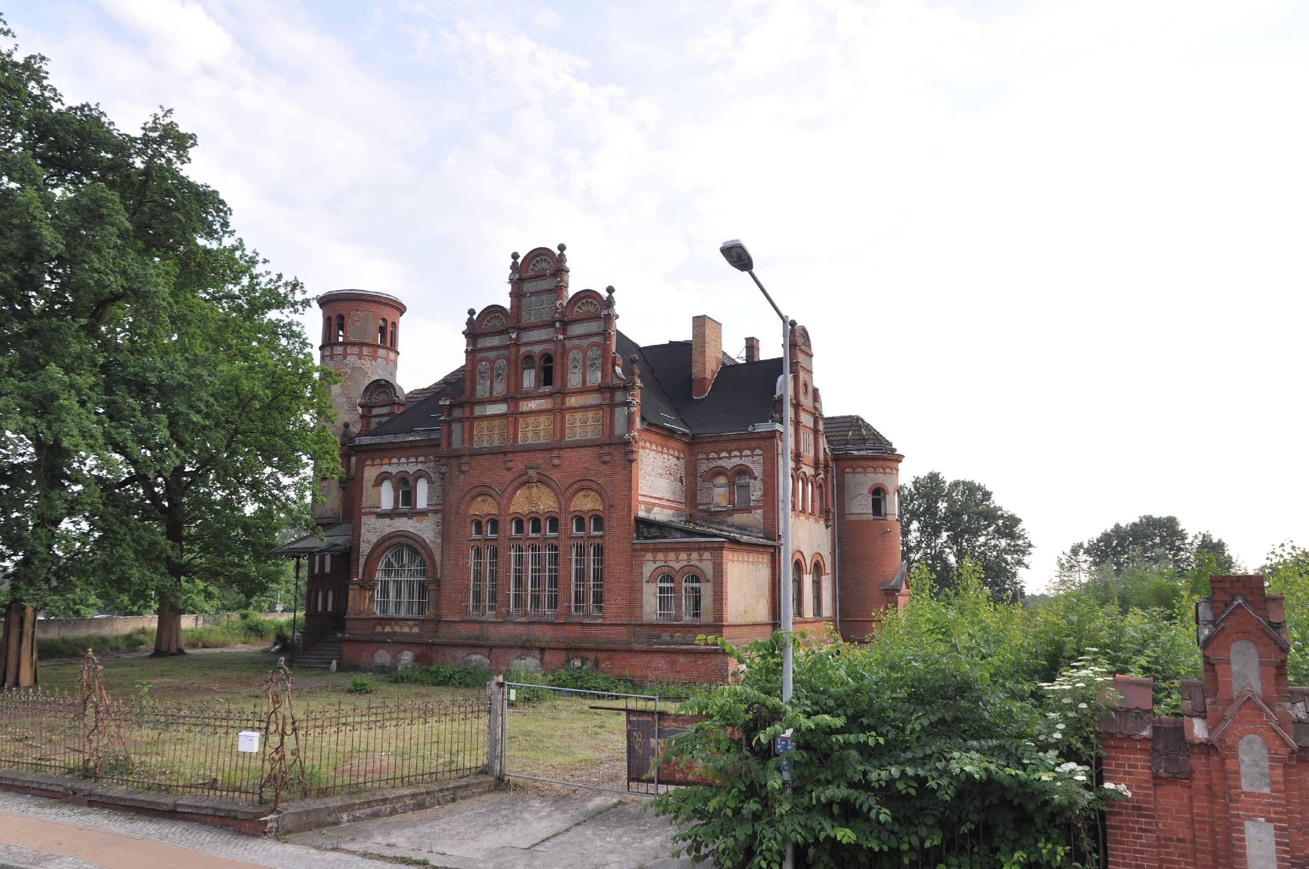 ehemaliges Offizierkasino des Großherzoglich Mecklenburgischen Feldartillerie-Regiments Nr. 60 in Schwerin, Mecklenburg-Vorpommern (Landtagsprojekt Mecklenburg-Vorpommern 2013)